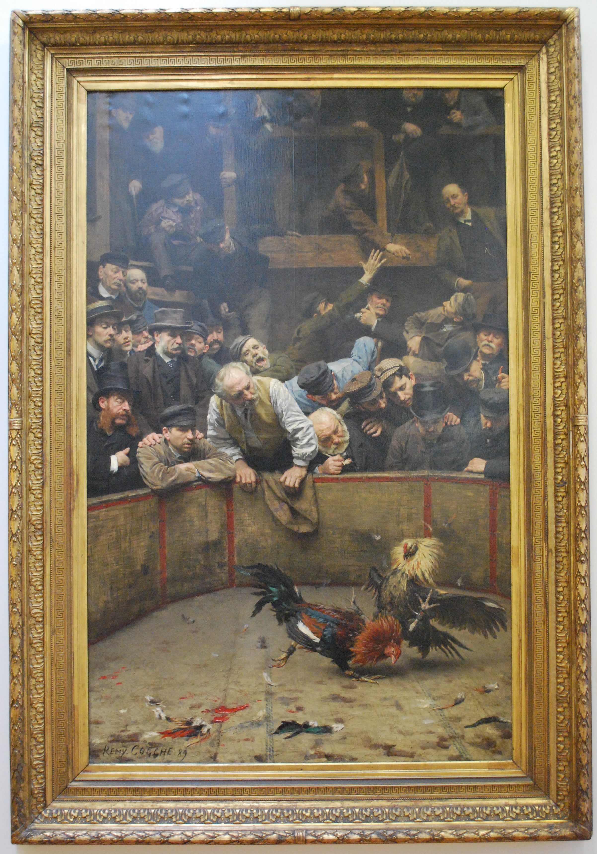 Combats de coqs en Flandres